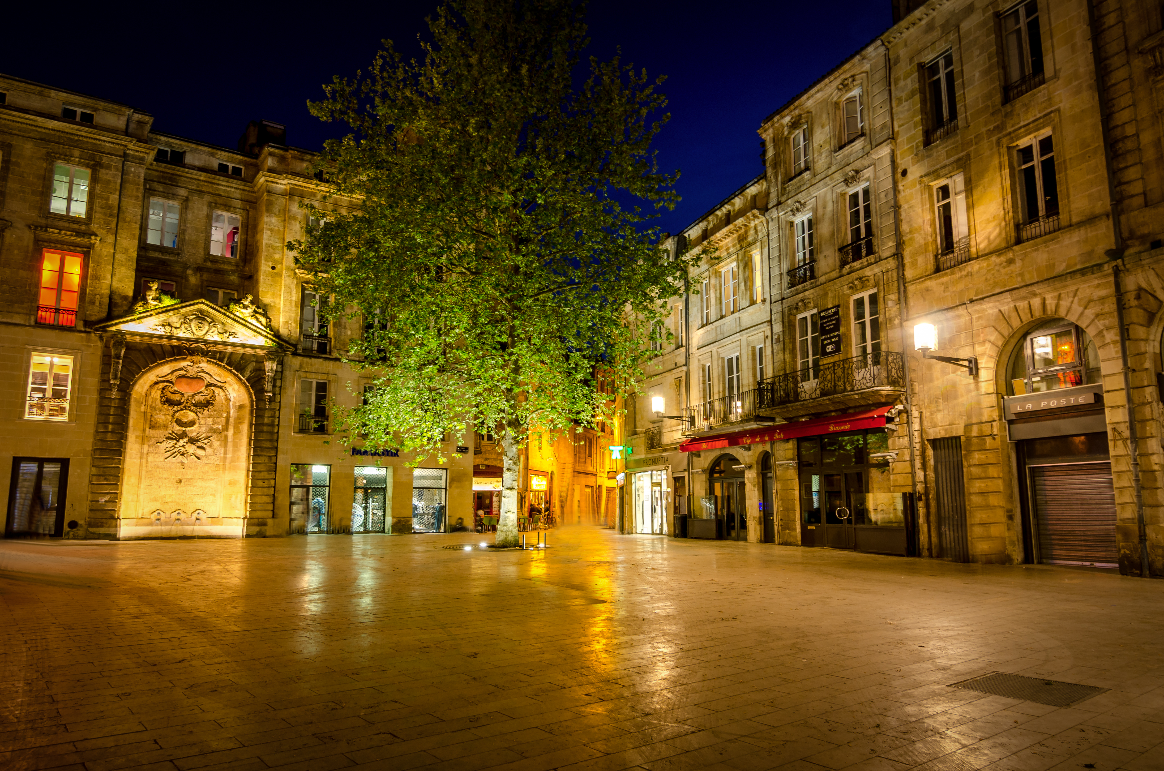 Fontaine Saint-Projet et place Saint-Projet à Bordeaux.